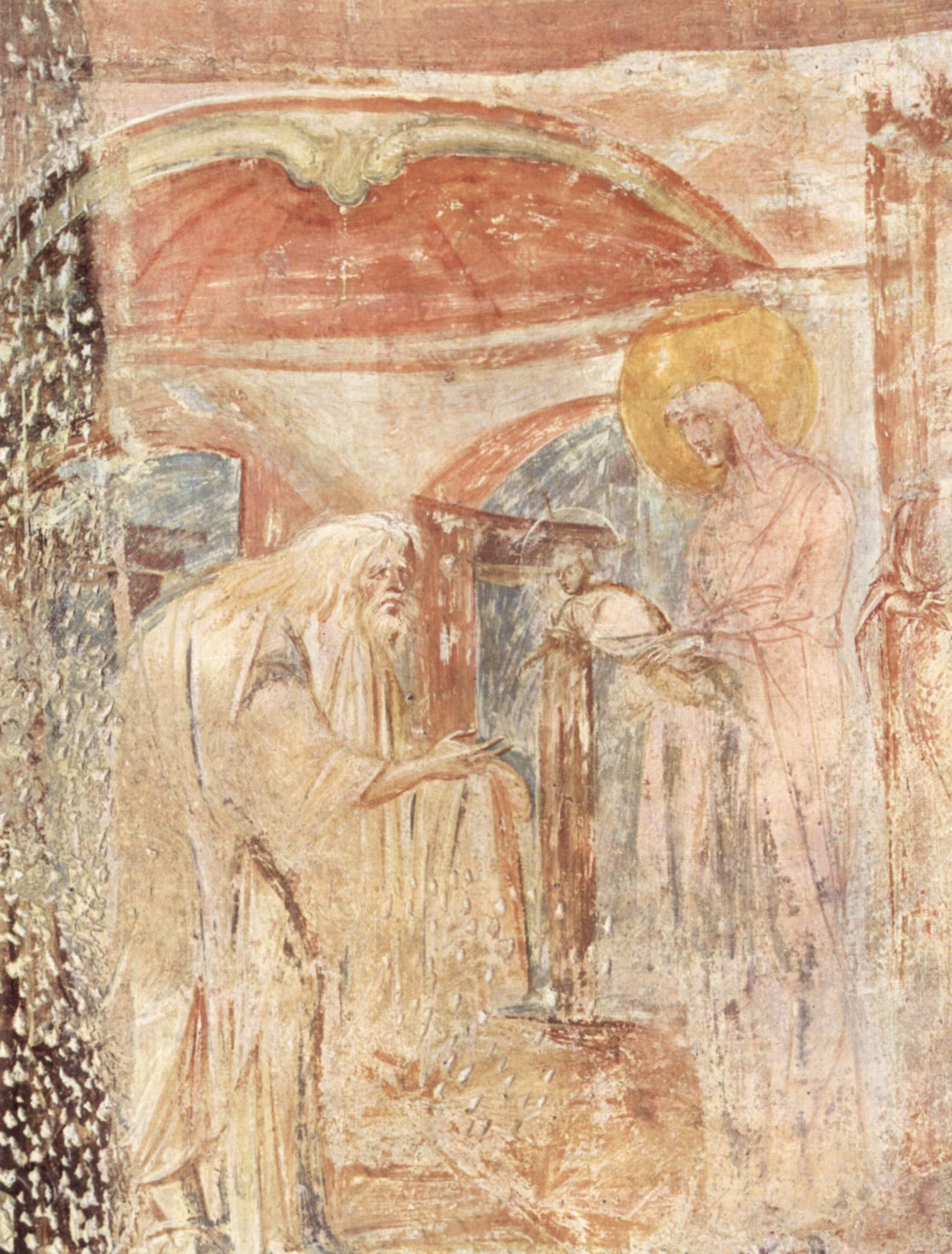 Fresken in der Pfarrkirche Castelseprio (Ostchor), Szene: Läuterung